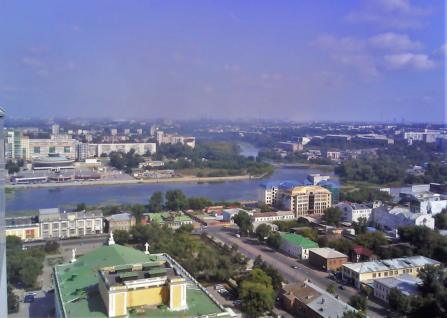 Tsentralnyy rayon, Chelyabinsk, Chelyabinskaya oblast', Russia